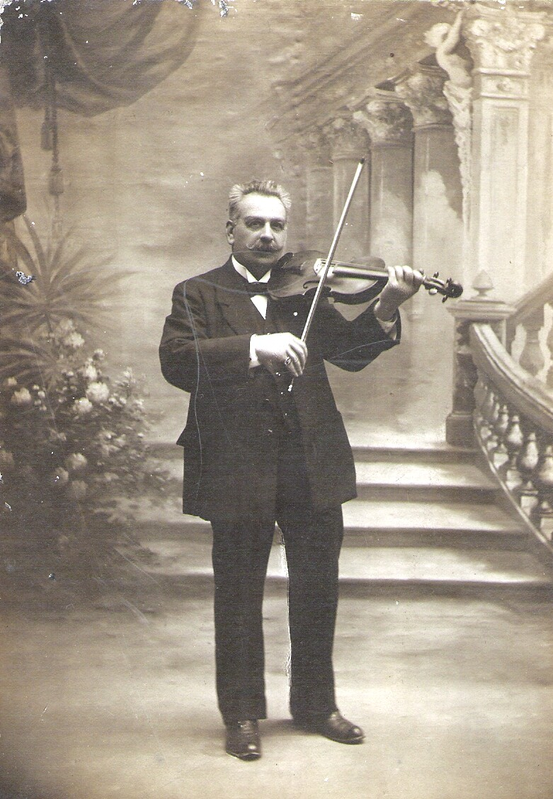 Fernando Palatín en su madurez